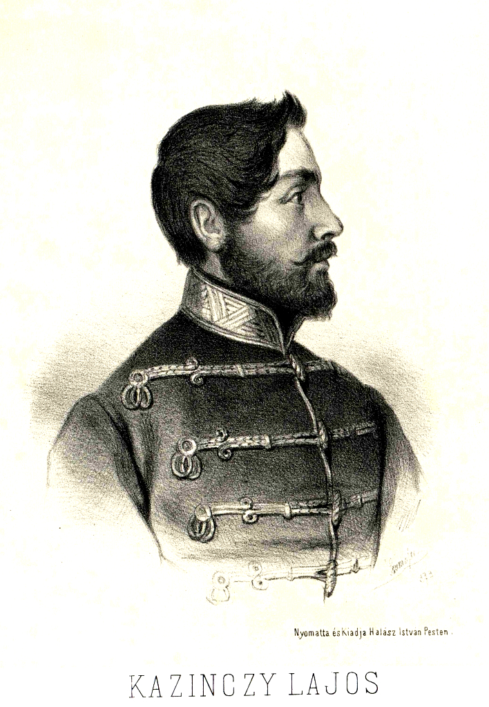 Kazinczi és alsóregmeczi Kazinczy Lajos (Széphalom, 1820. október 20. – Arad, 1849. október 25.) honvédezredes, Kazinczy Ferencnek és feleségének, gróf Török Sophie-nak legifjabb fia, a szabadságharc vértanúja.